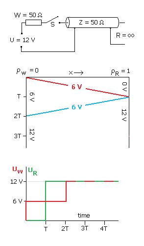 Lattice-Diagram (Impulsfahrplan) und Oszillogramm der Spannungen an Anfang (rot) und Ende (grün) einer am Ende offenen Koaxleitung (Reflexionsfaktor = +1). Eingespeist wird ein Spannungssprung von 0 V auf 12 V aus einer Quelle mit Innenwiderstand 50 Ohm. Im mittleren Bild ist der Ort des Sprunges (hor. Achse) als Funktion der Zeit (vertikale Achse) eingezeichnet.